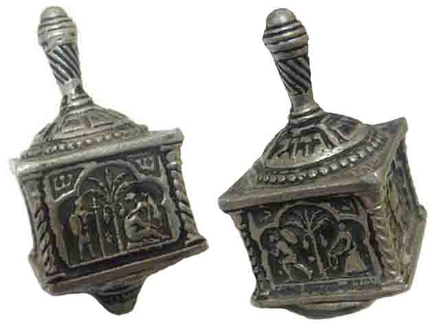 סביבון ארד מורו